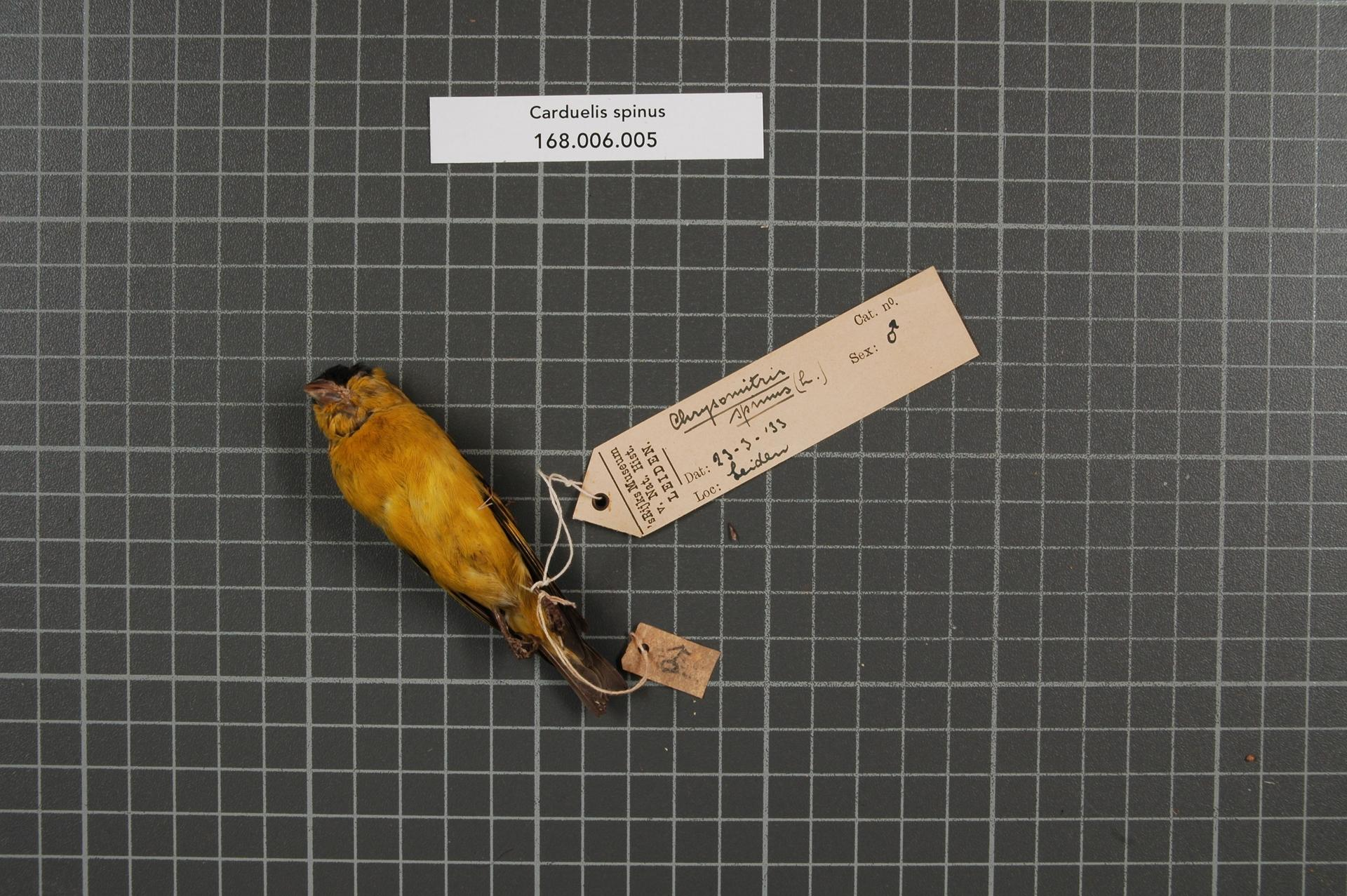 Carduelis yarrellii (Audubon, 1839)